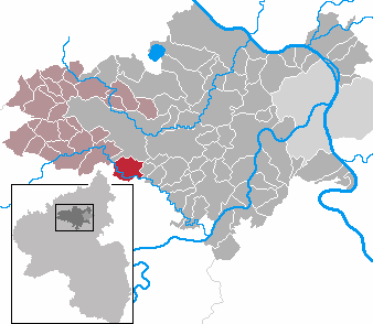 Kehrig in Rhineland-Palatinate - district Mayen-Koblenz